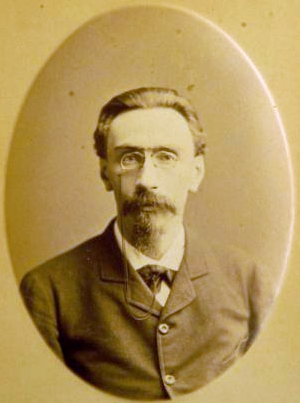 Давыдов, Николай Васильевич